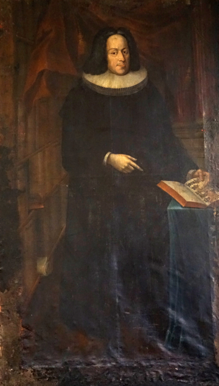 Reproduktion des Ölgemäldes eines unbekannten Malers in der Johanniskirche Lüneburg. Die Devise im aufgeschlagenen Buch ist dem Neuen Testament entnommen (Brief an die Philipper, Kapitel 1 Vers 27) und lautet: "wandelt nur würdig dem evangelium christi"